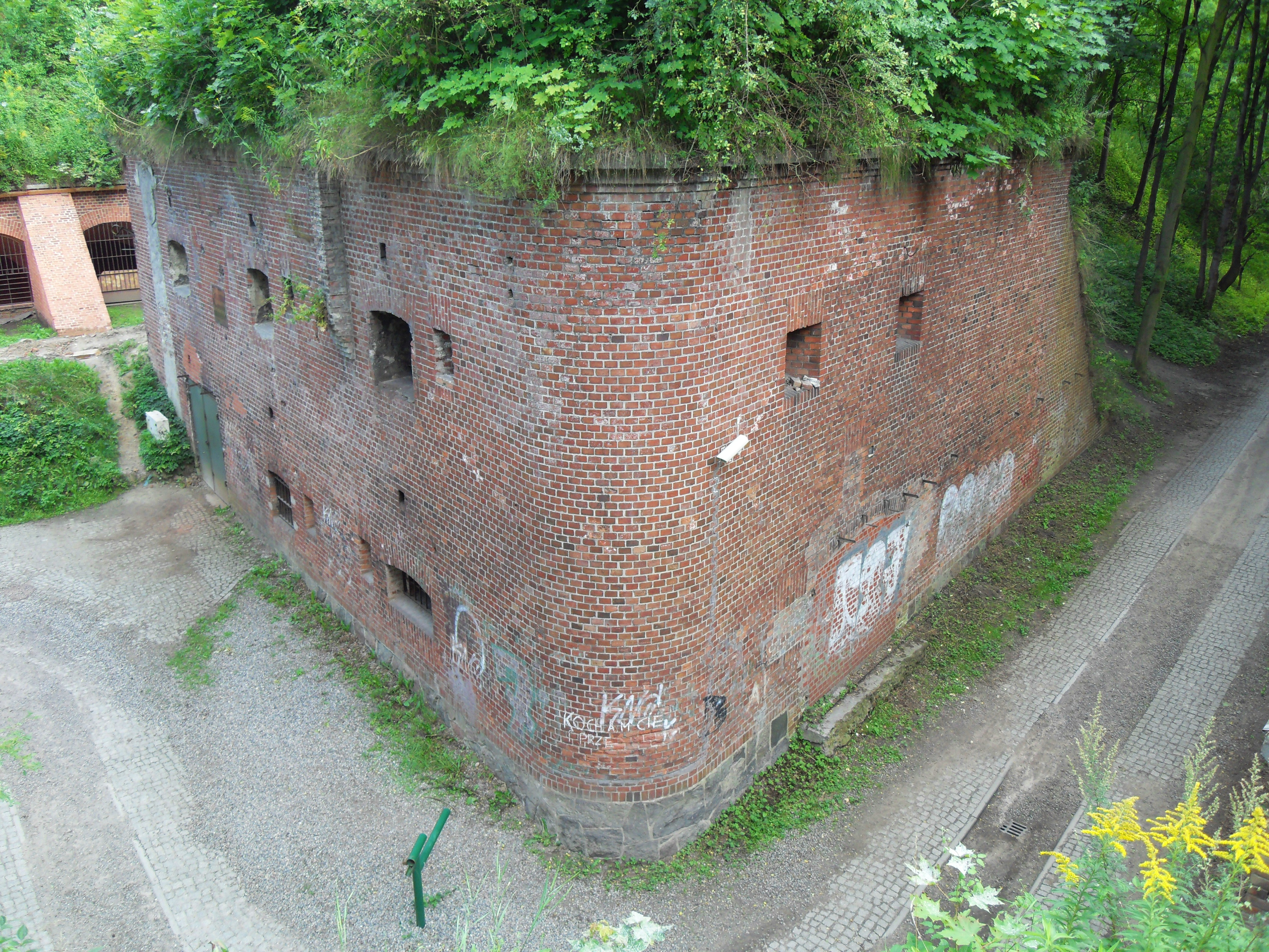 Gdańsk Grodzisko, kaponiera środkowa.